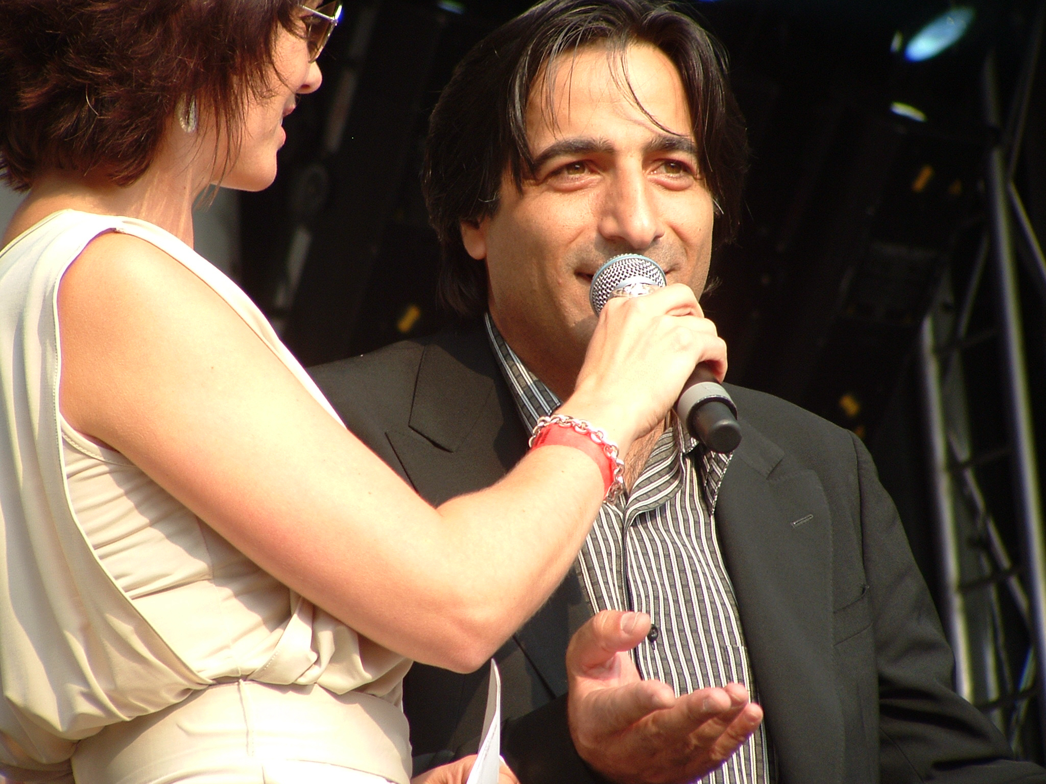 Cahit Ölmez wordt geïnterviewd door Geena Lisa op Flikkendag 2008.